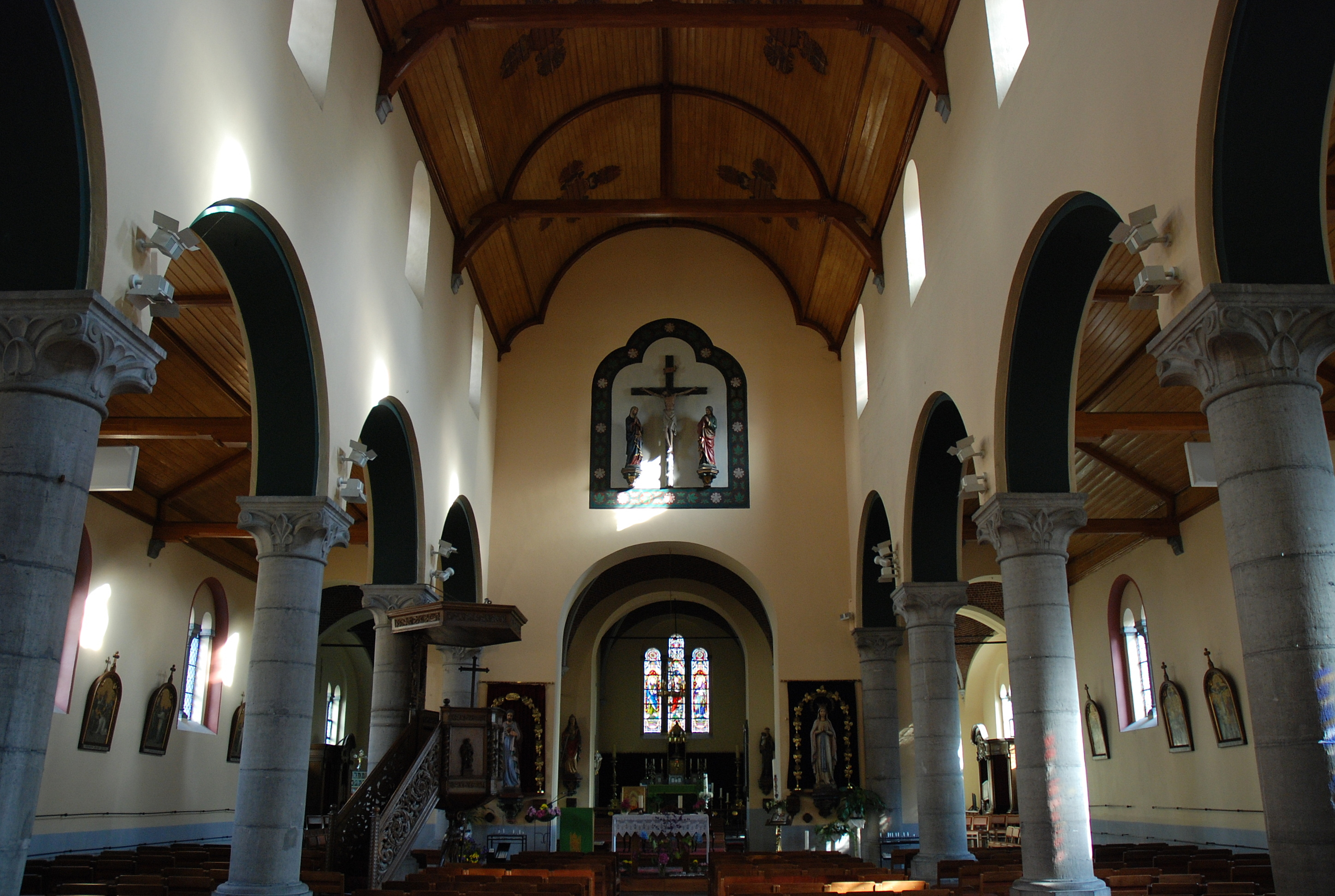 De Heilig-Kruiskerk te Lotenhulle, België